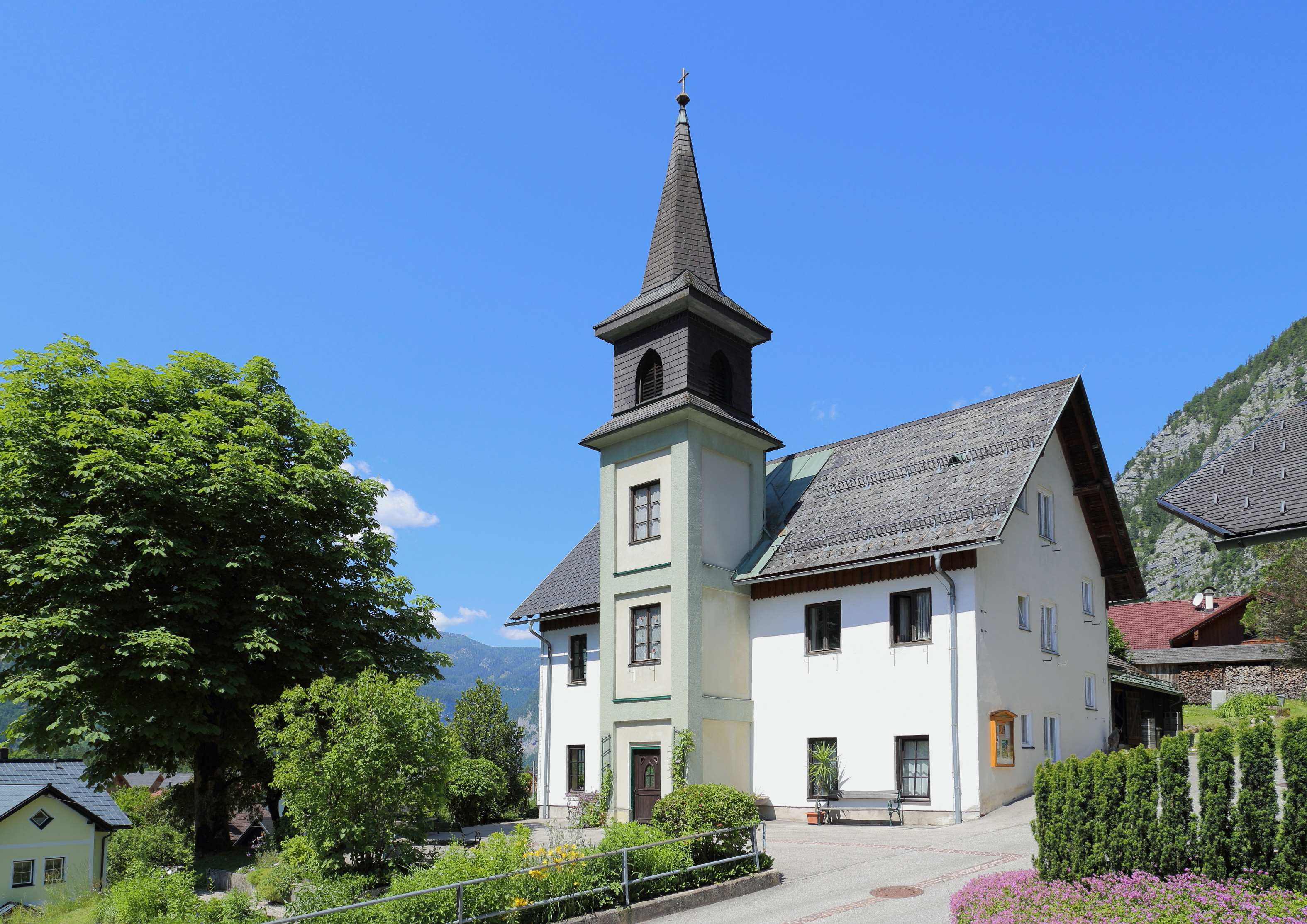 Das denkmalgeschützte evangelische Schul- und Bethaus in der oberösterreichischen Gemeinde Obertraun.